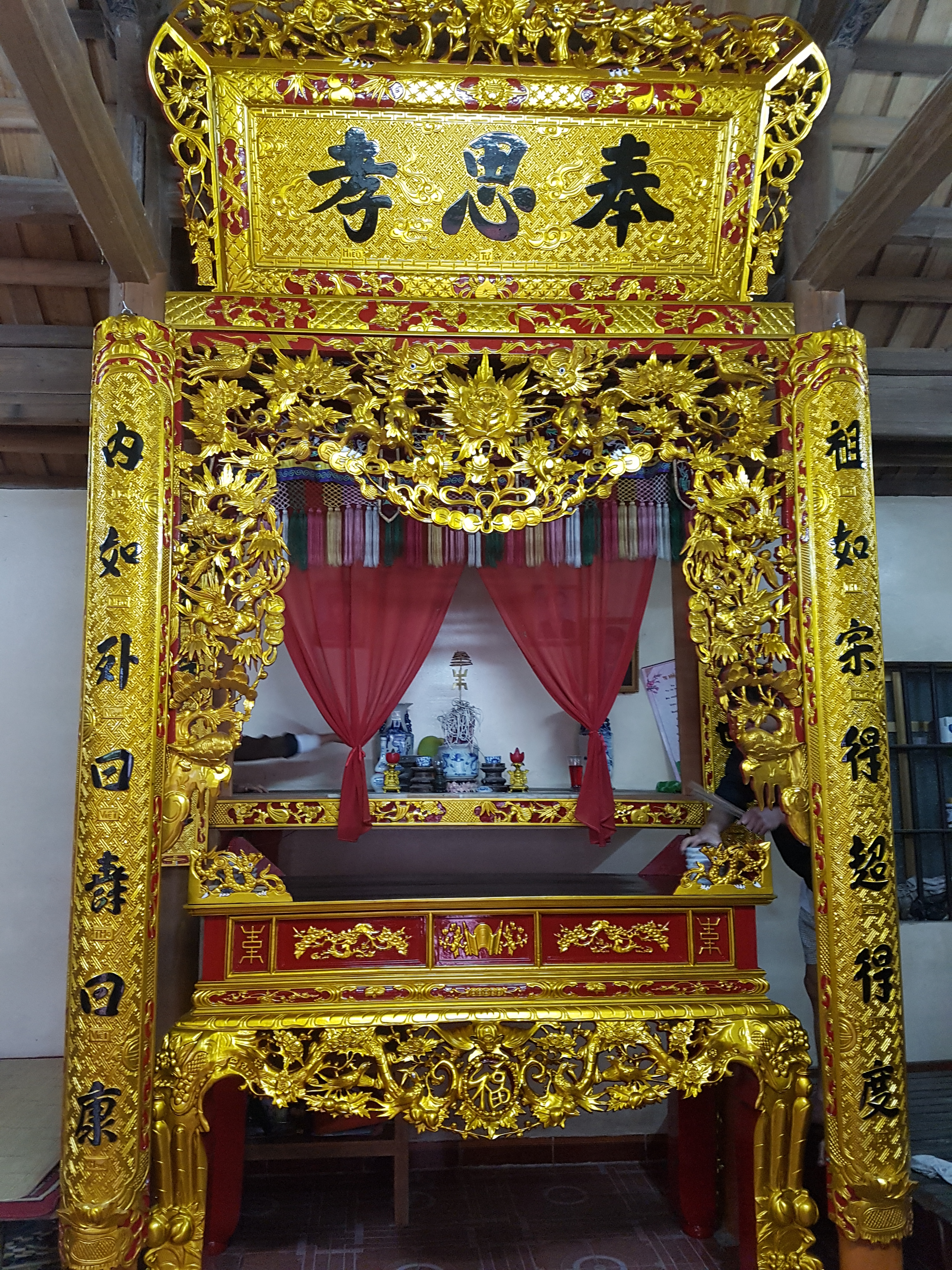 Bàn thờ gia đình truyền thống